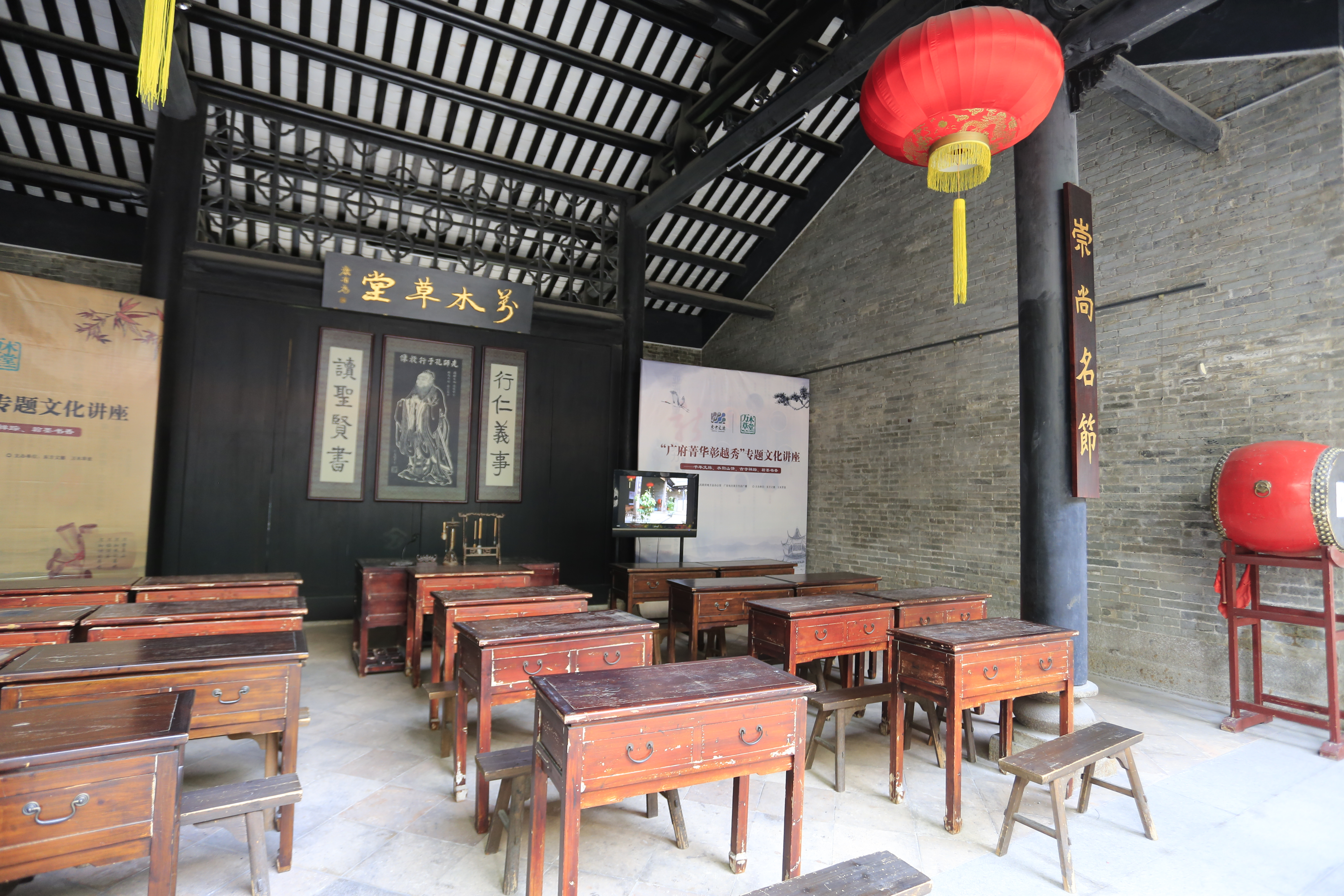 广州万木草堂